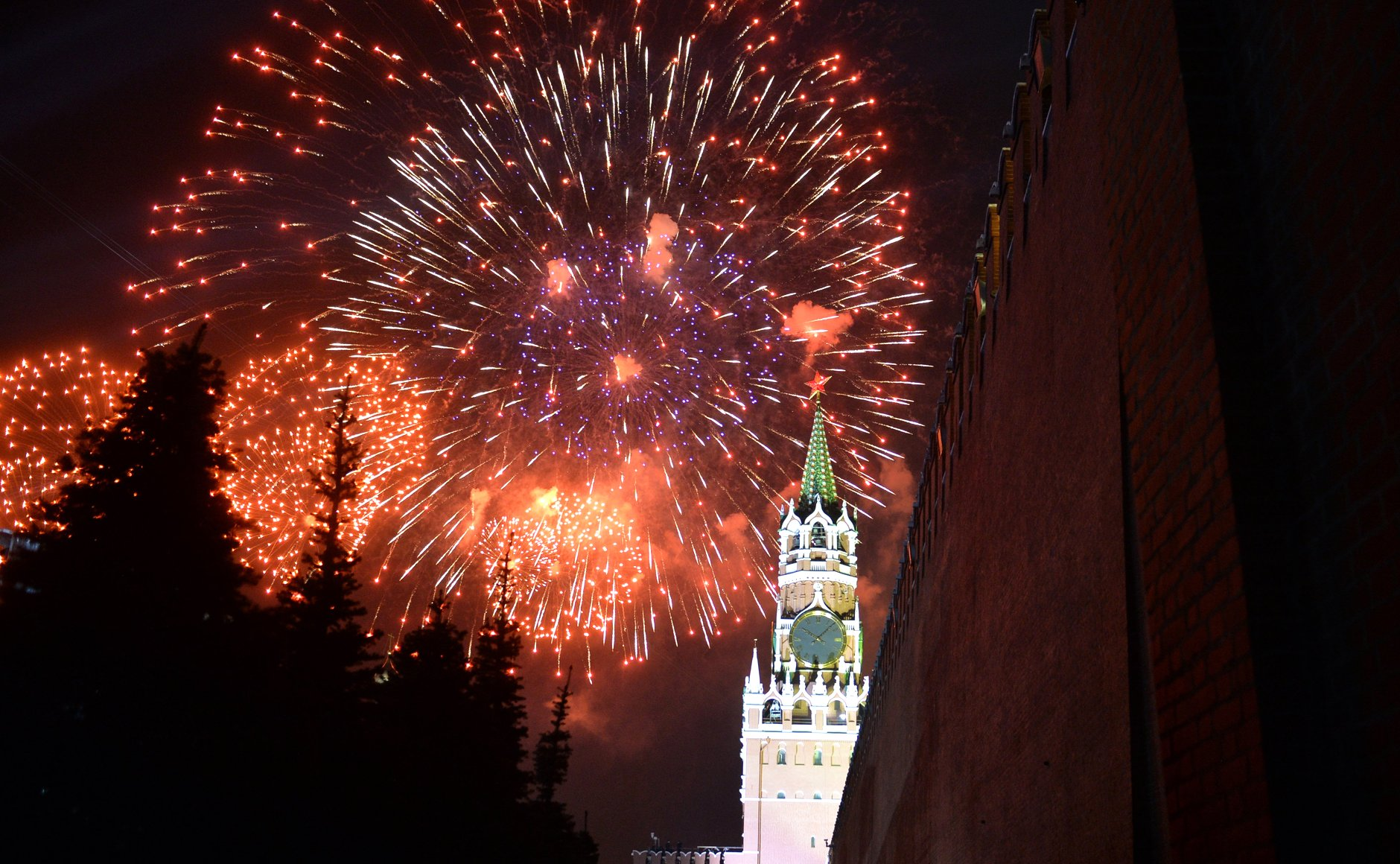 Концерт в честь 70-летия Великой Победы